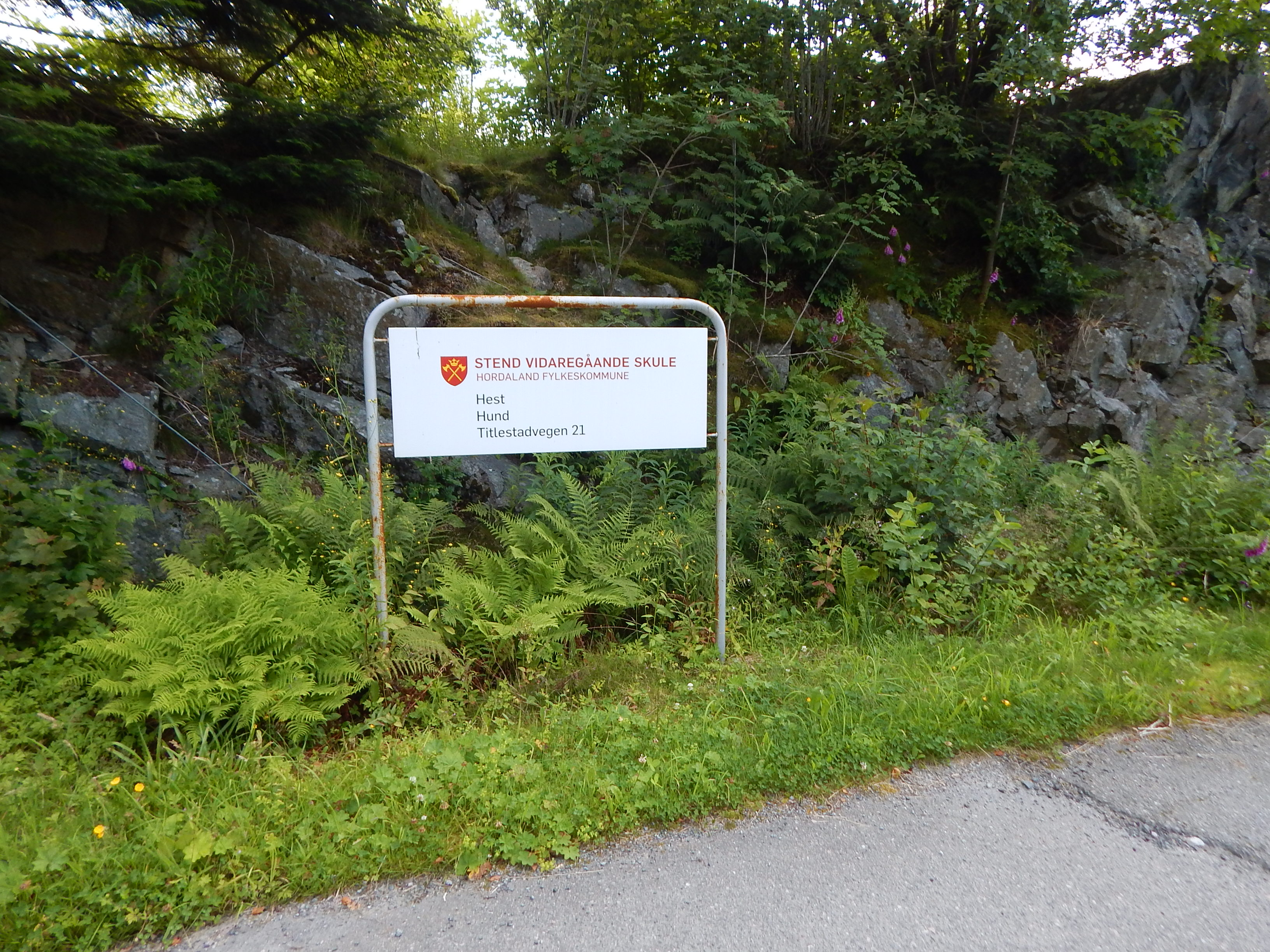 Stend videregående skole